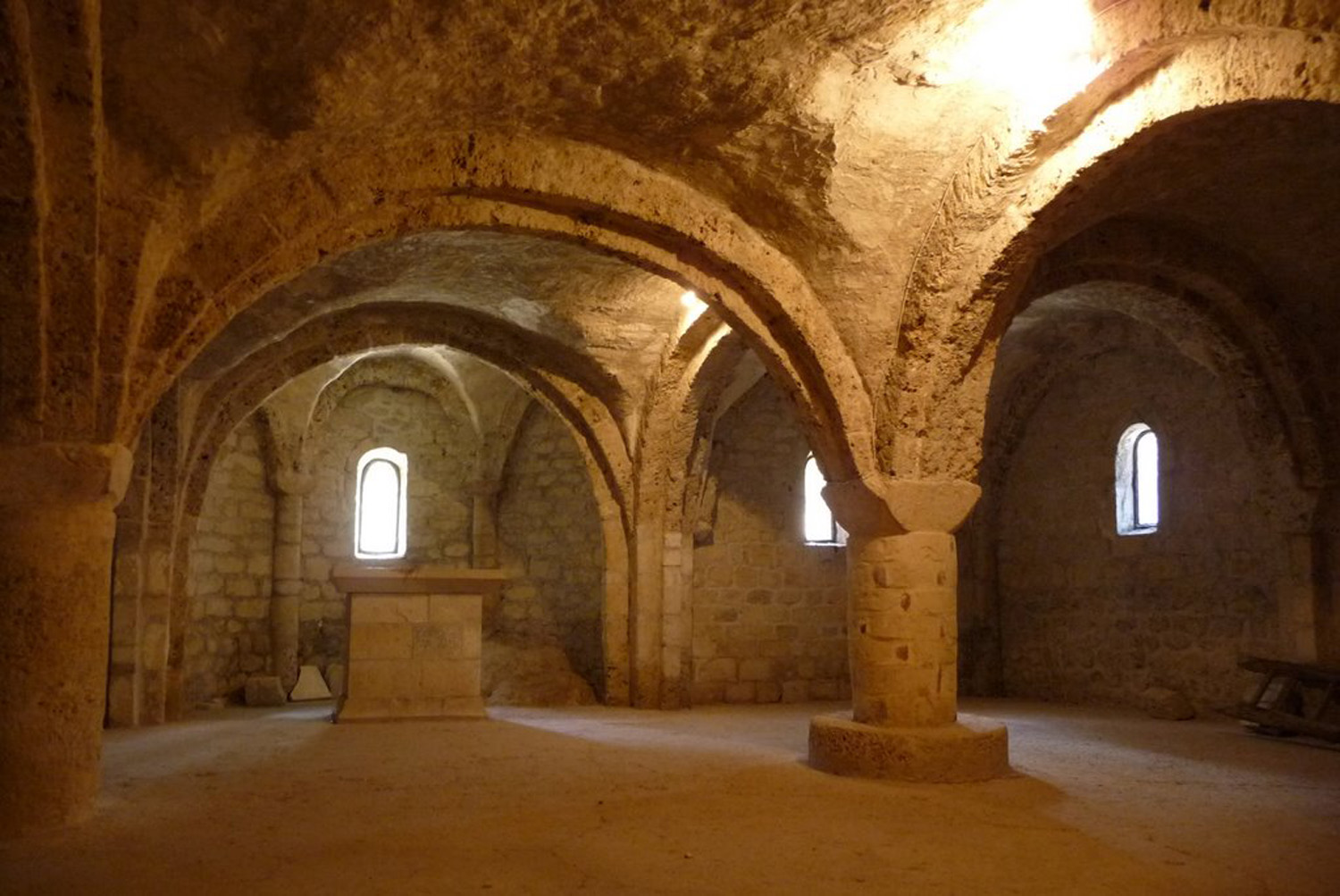 Chiesa di San Giovanni ad insulam, cripta dell'edificio religioso appartenente al complesso abbaziale omonimo nei pressi del paese di Isola del Gran Sasso in provincia di Teramo, Abruzzo, Italia